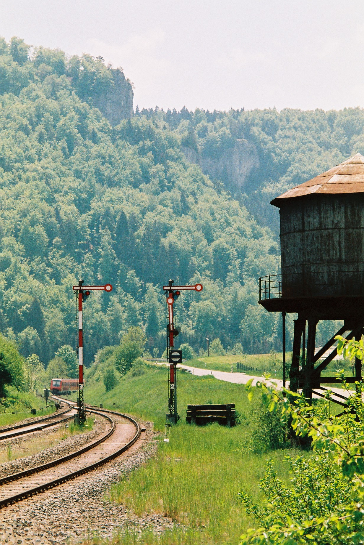 Wasserturm bei Hausen im Tal - Beuron - Germany